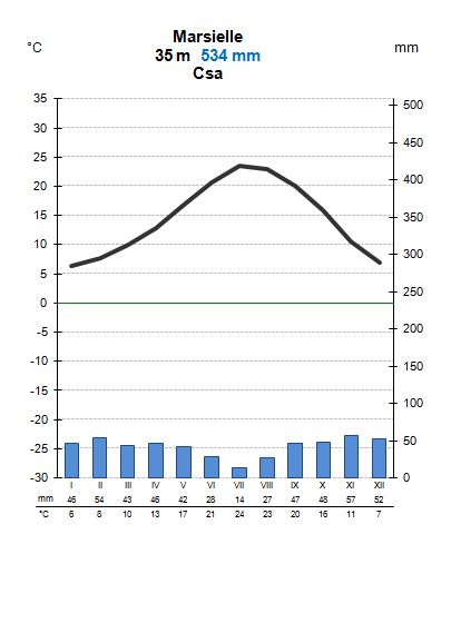 Marsielle kliimadiagramm.